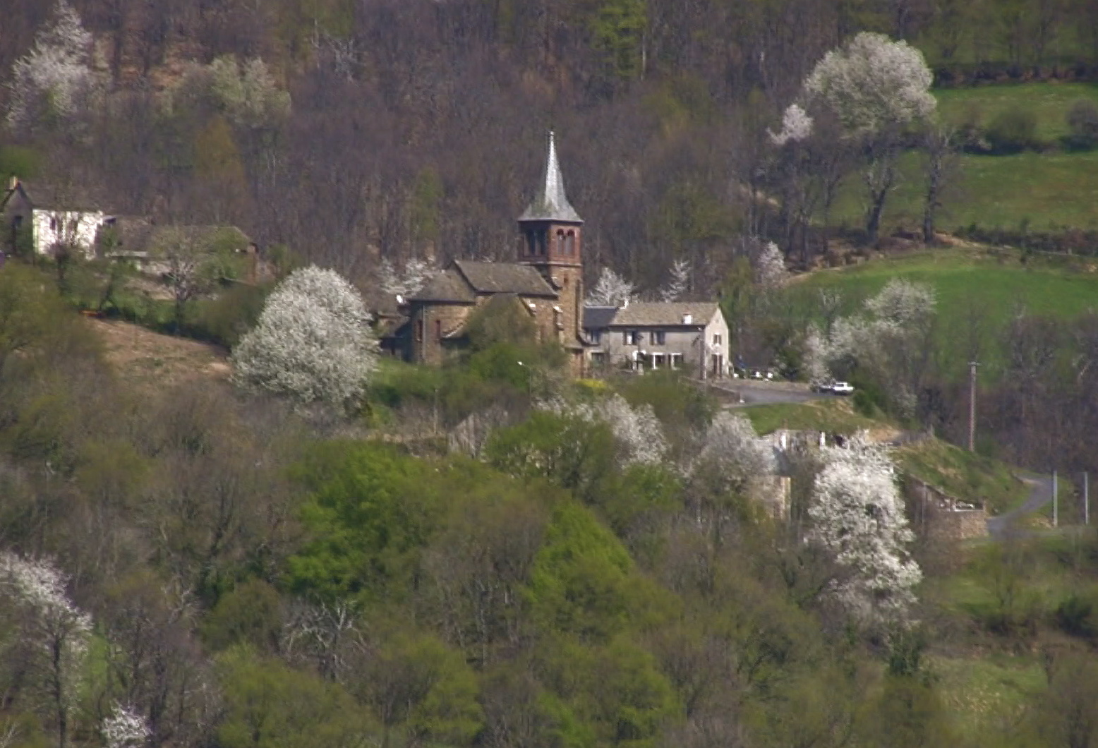 L'église de La Boulesq Pomayrols (Aveyron-France) Située sur le versant Sud de la vallée, au milieu du charmant village de La Boulesq, l’église dont le clocher est bâti en grès rose de Saint Laurent d'olt - Saint Laurent d'Olt - date de 1893. Elle fut construite à partir de 1890 par les habitants du village. Les travaux furent dirigés par Xavier Fournier. Auparavant, à l'endroit du Presbytère actuel, il existait une petite chapelle également dédiée à Saint Roch qui datait de 1777. Cette chapelle fut érigée en paroisse le 26 avril 1787 par l'évêque de Rodez de l’époque : Jérôme-Marie Champion de Cicé.